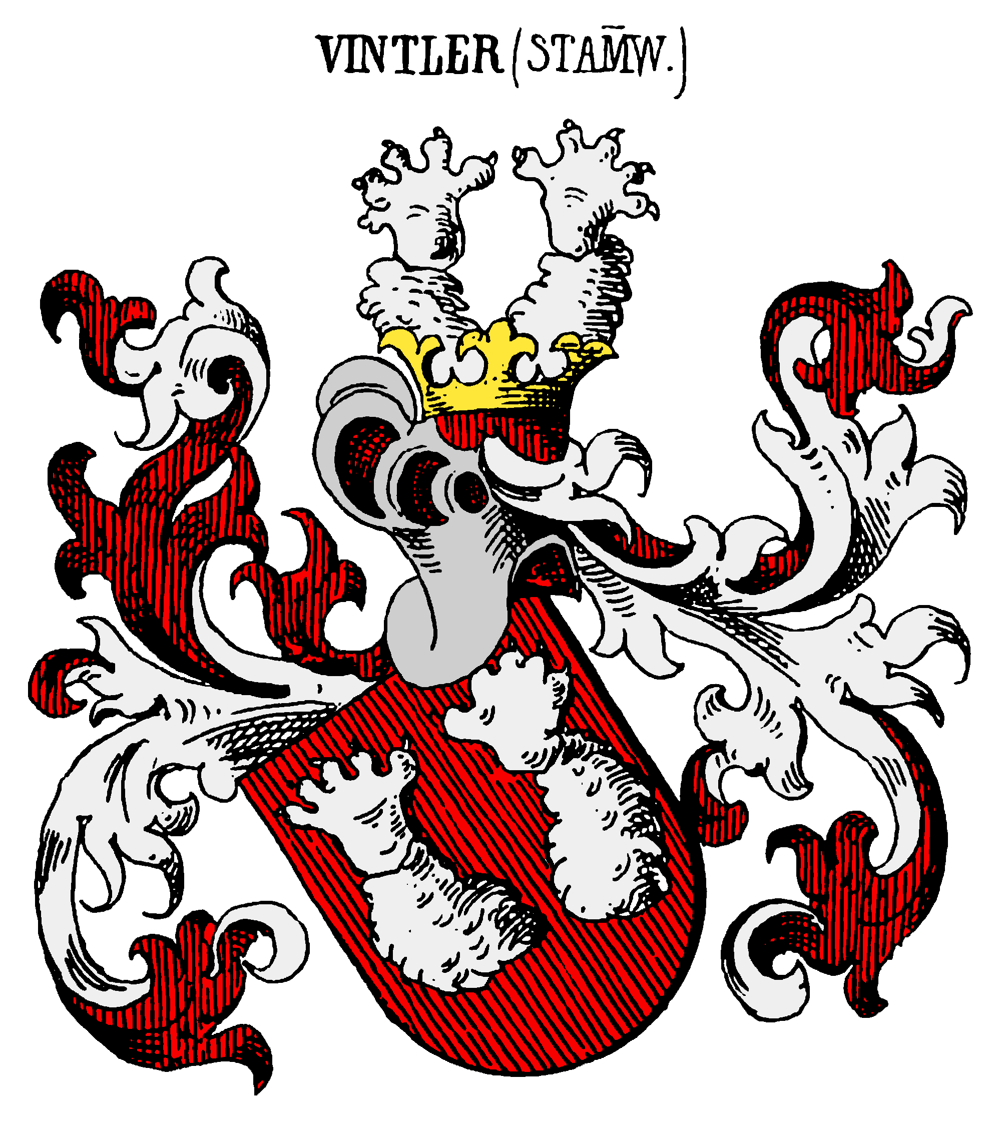 Wappen der Vintler von Bozen 1414